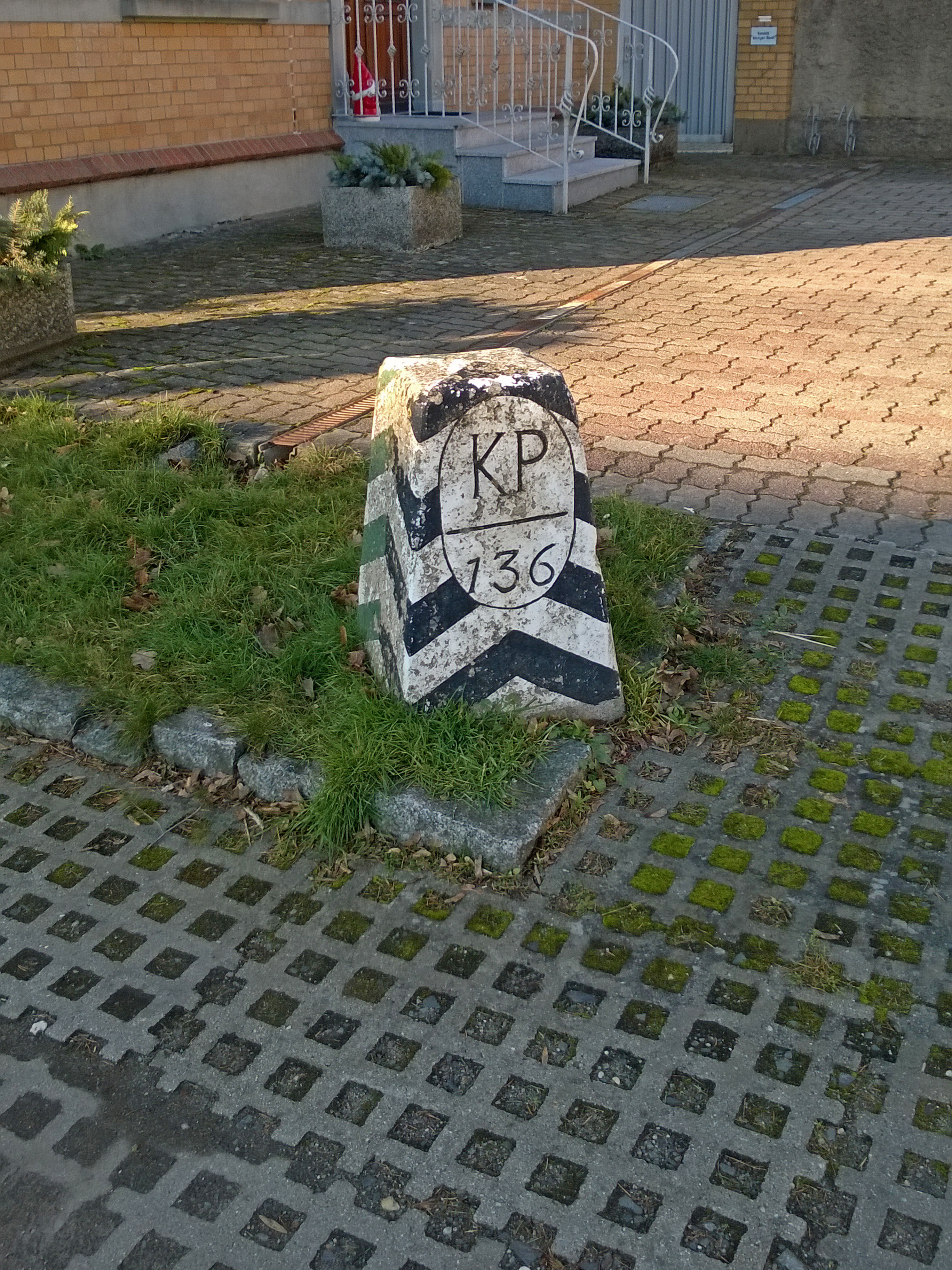 Grenzstein Nr. 136 - historische Landesgrenze Königreich Sachsen Königreich Preußen 1815 (Wiener Kongress)